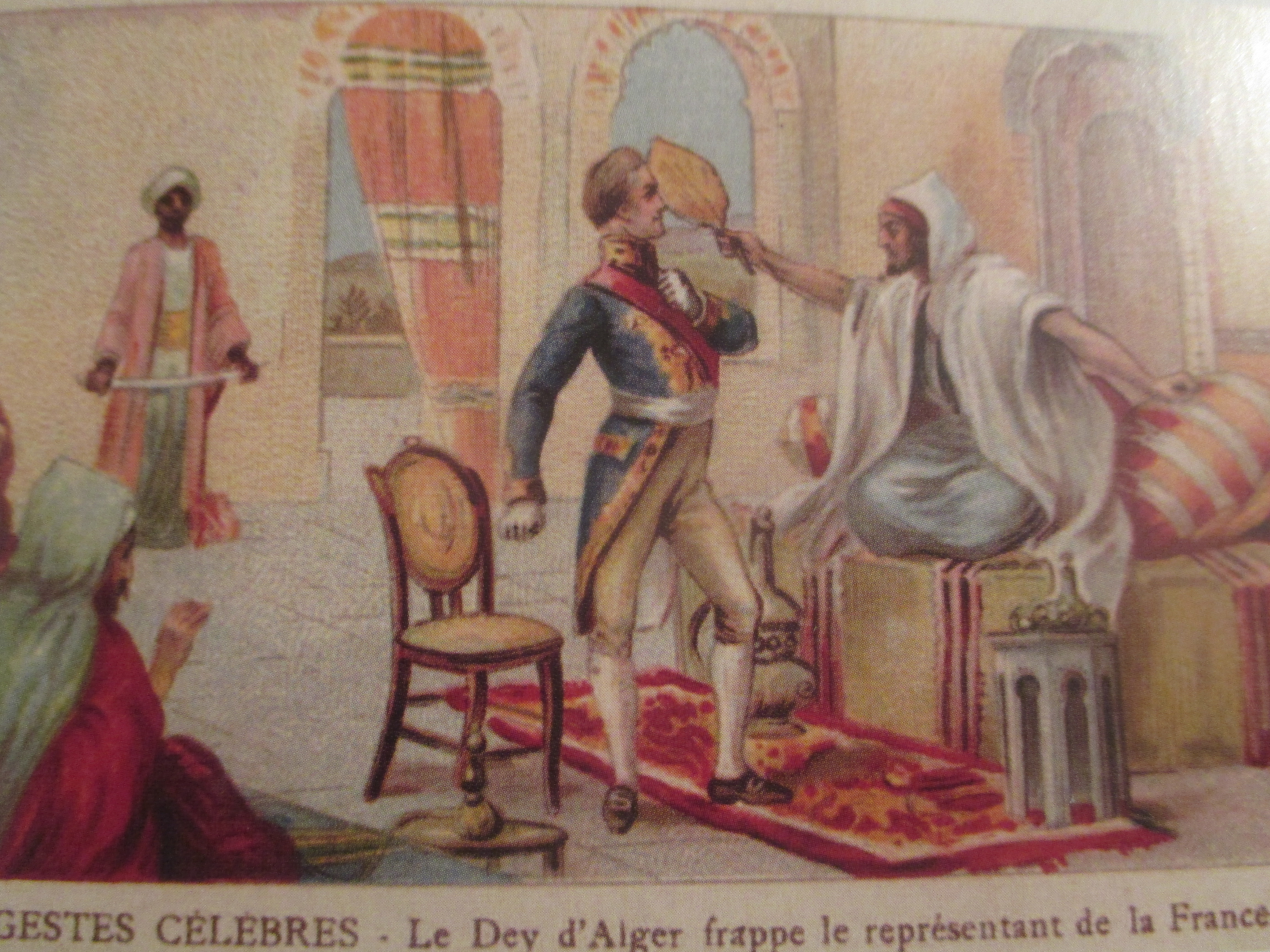 Le coup d'éventail du dey d'Alger contre le consul français.